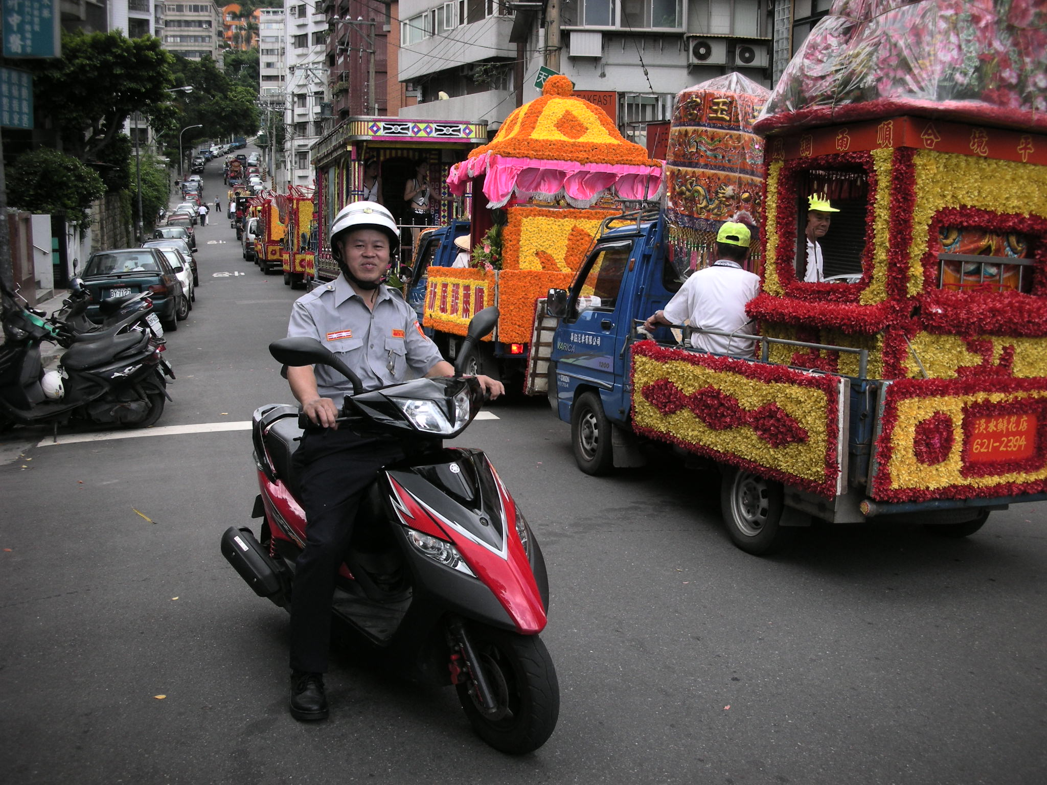 中文（台灣）: 臺北市義勇警察大隊隊員騎山葉機車跟在迎神遶境車隊後方。